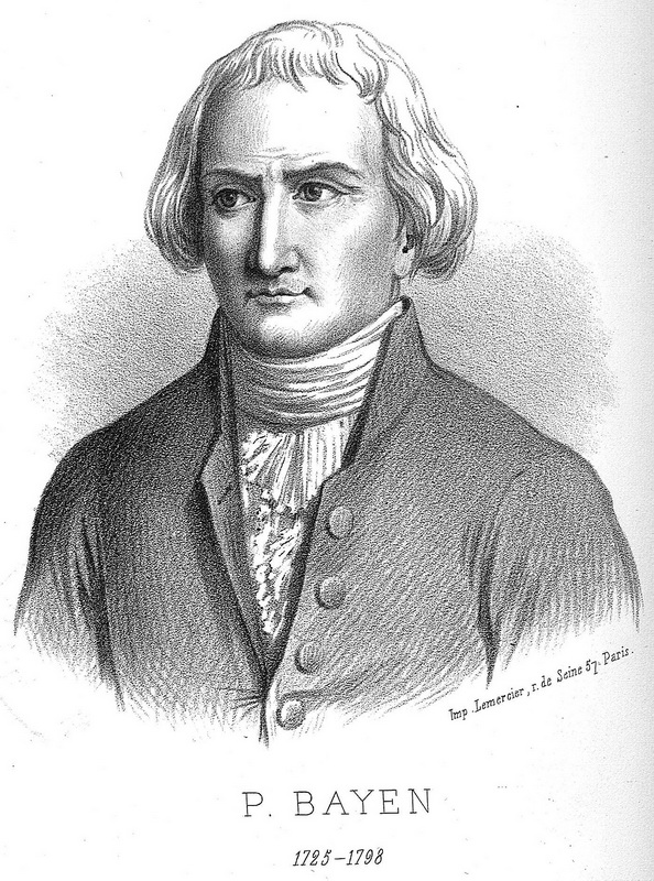 Pierre Bayen